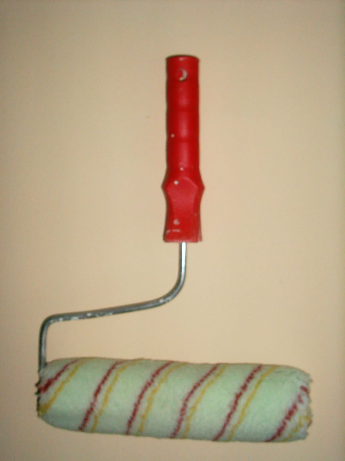 Ваљак за кречење.